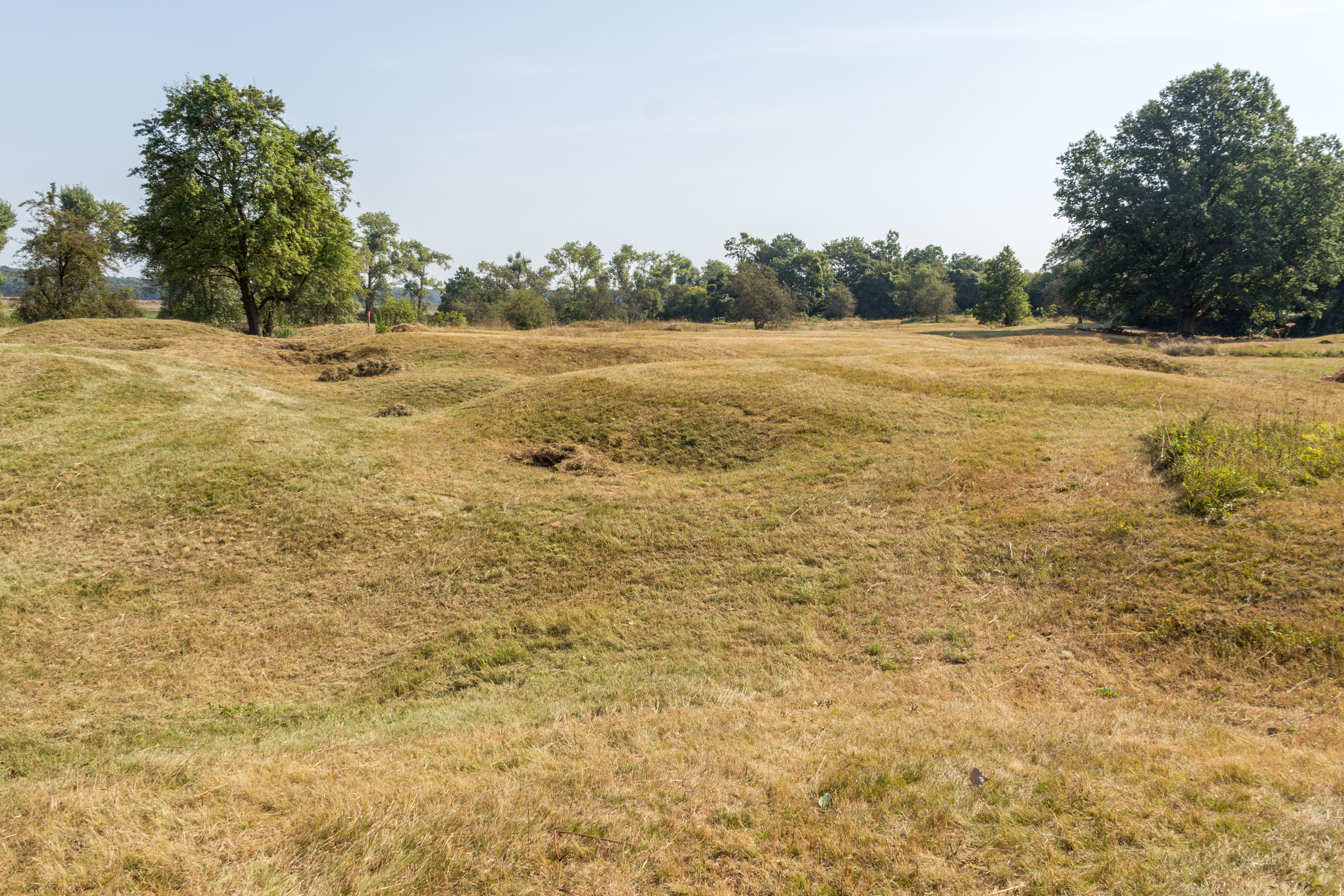 Sulzheimer Gipshügel, Naturschutzgebiet, Geotop, Sulzheim in Unterfranken